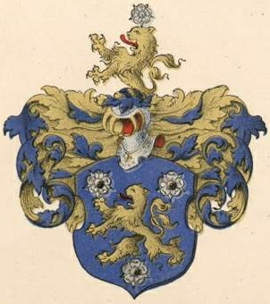 Roseni (valge) suguvõsa aadlivapp